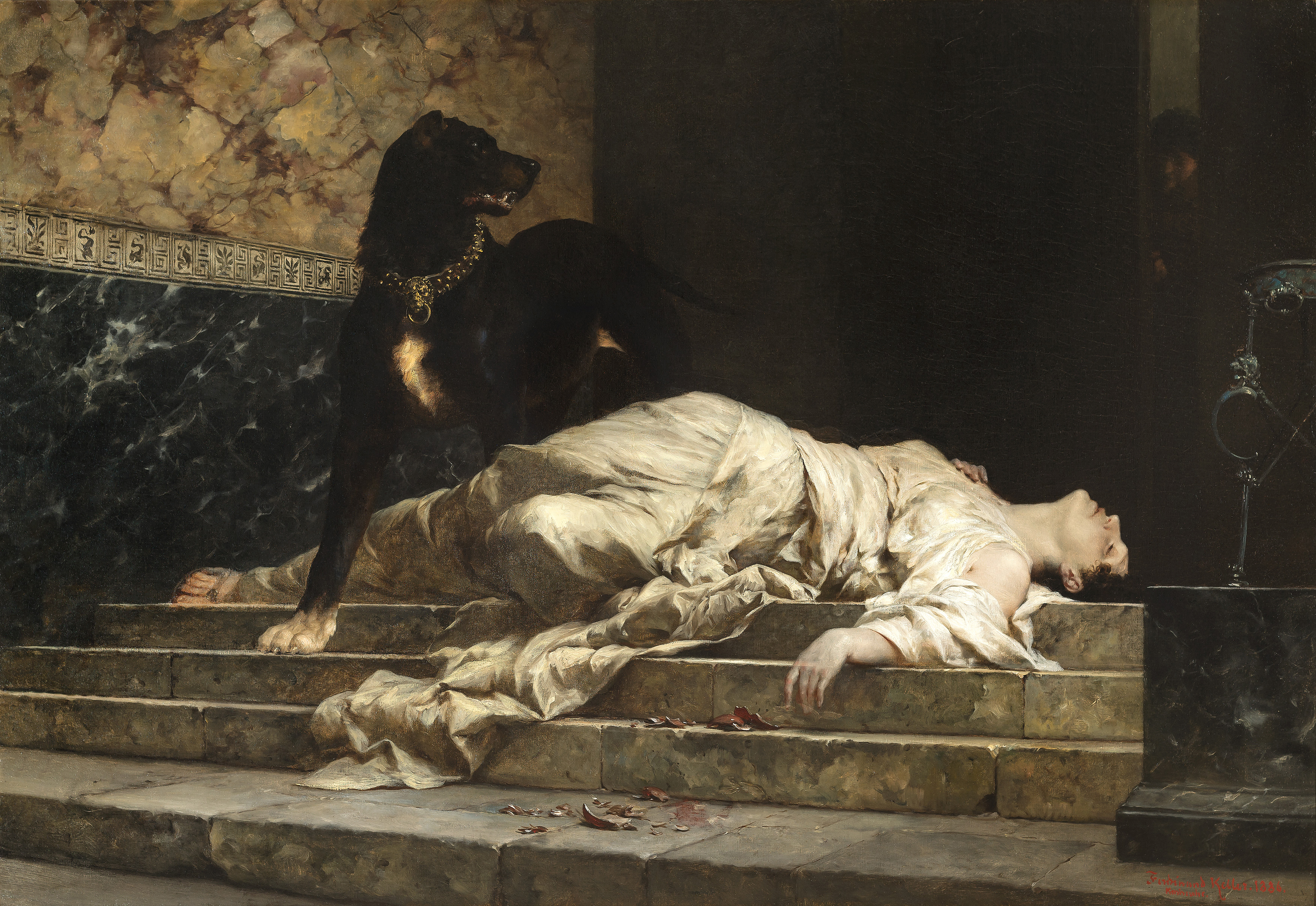 Ferdinand von Keller: Selene, 1886, Öl auf Leinwand, 76 x 110,5 cm